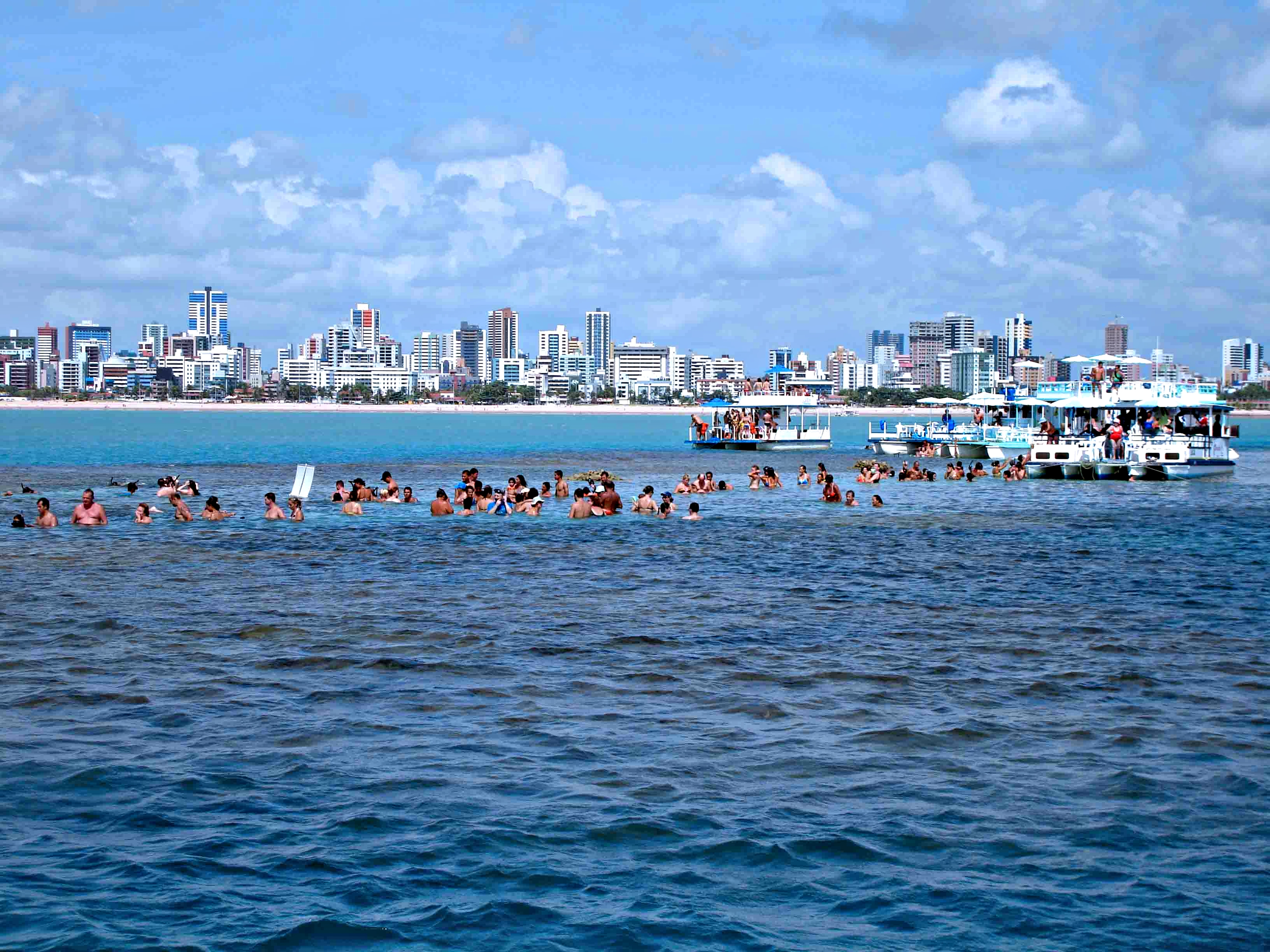 Foto do recife de Picãozinho com a cidade de João Pessoa ao fundo